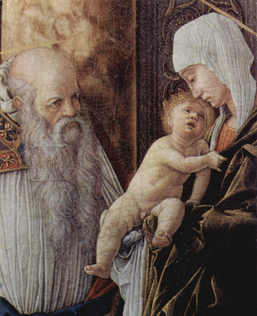 Altarretabel der Palastkapelle des Herzogs von Mantua